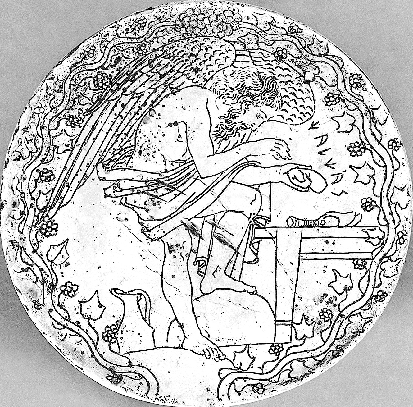 Miroir étrusque avec représentation de Calchas sous la forme d'un Haruspice. Vulci, Ve siècle av. JC. Musée du Vatican.